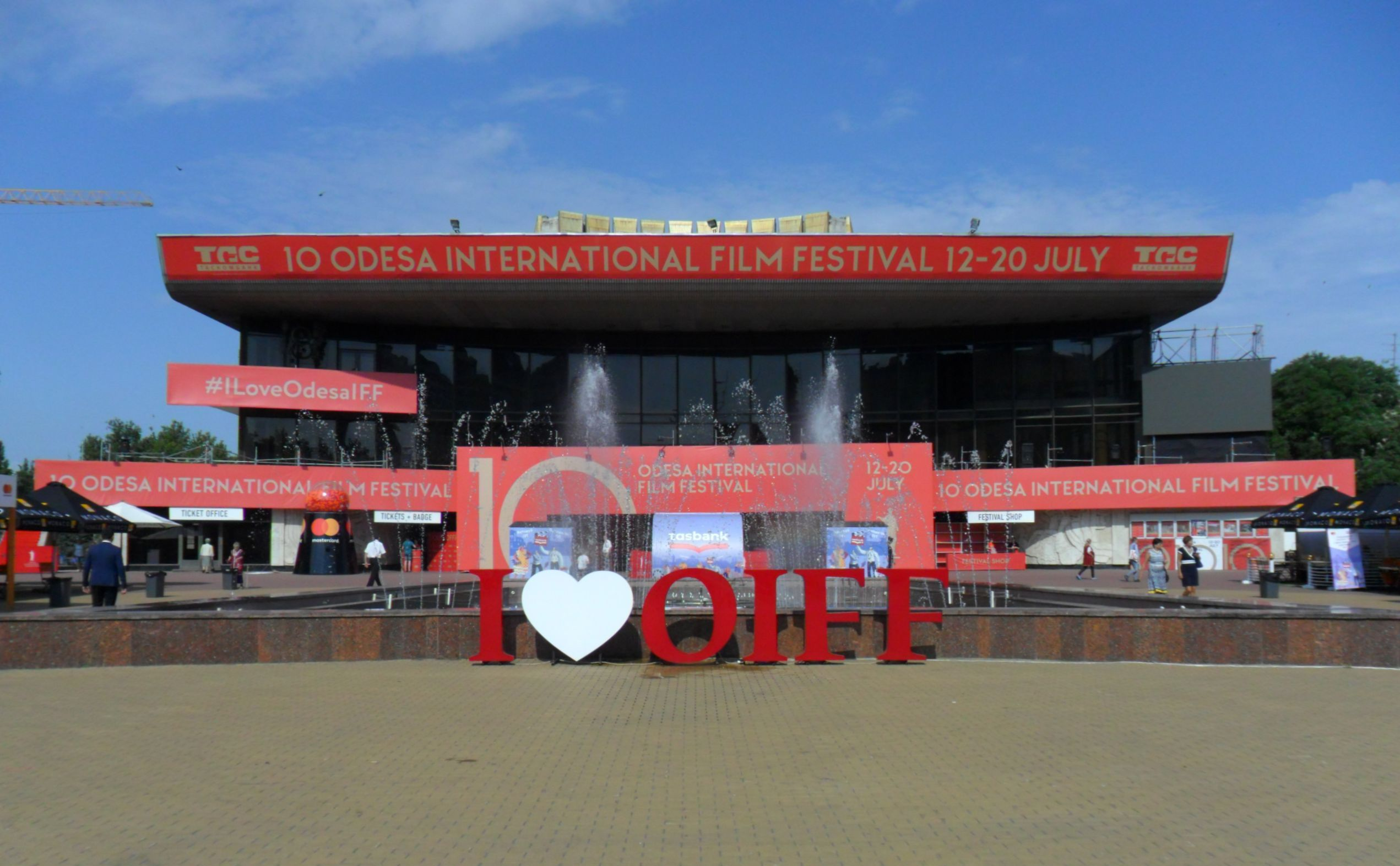 Фестивальний палац (Одеський академічний театр музичної комедії імені М. Водяного) під час 10-го Одеського міжнародного кінофестивалю. Липень 2019